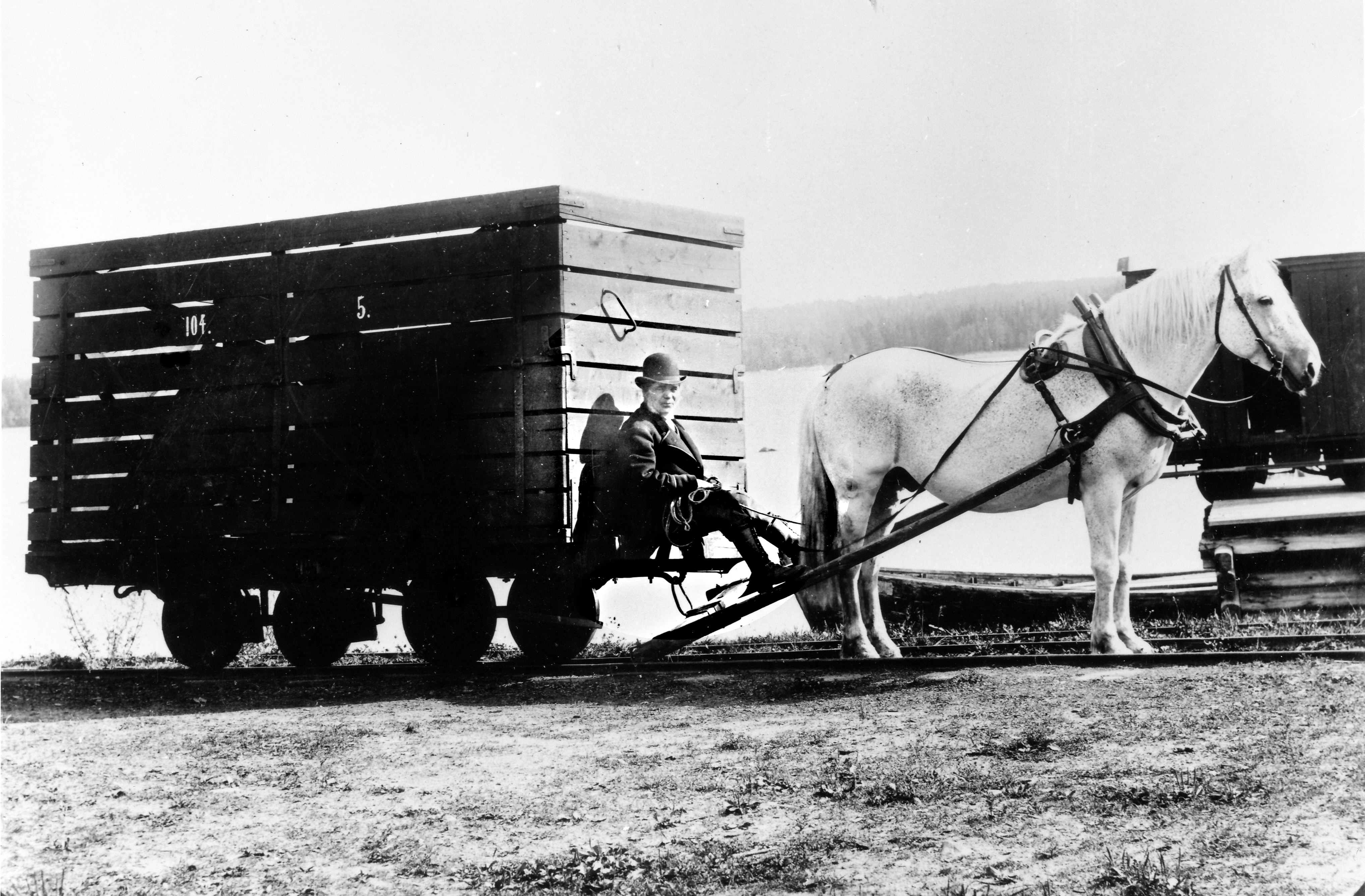 BLJ "godståg" på hästbanan Grycken-Bysjön 1879. Kusken heter Utter och var född 1829.